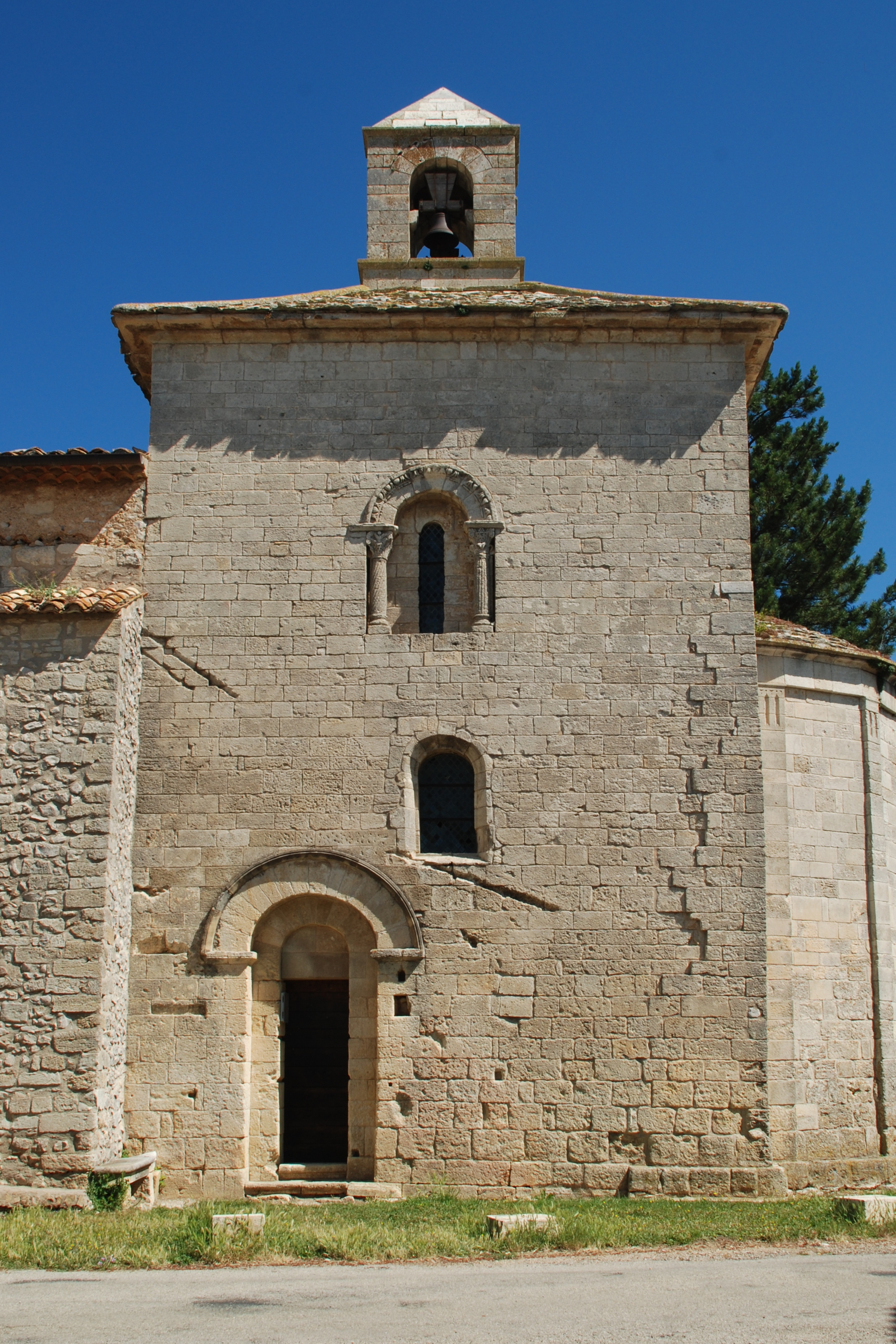 France - Provence - Église de Saint-Trinit